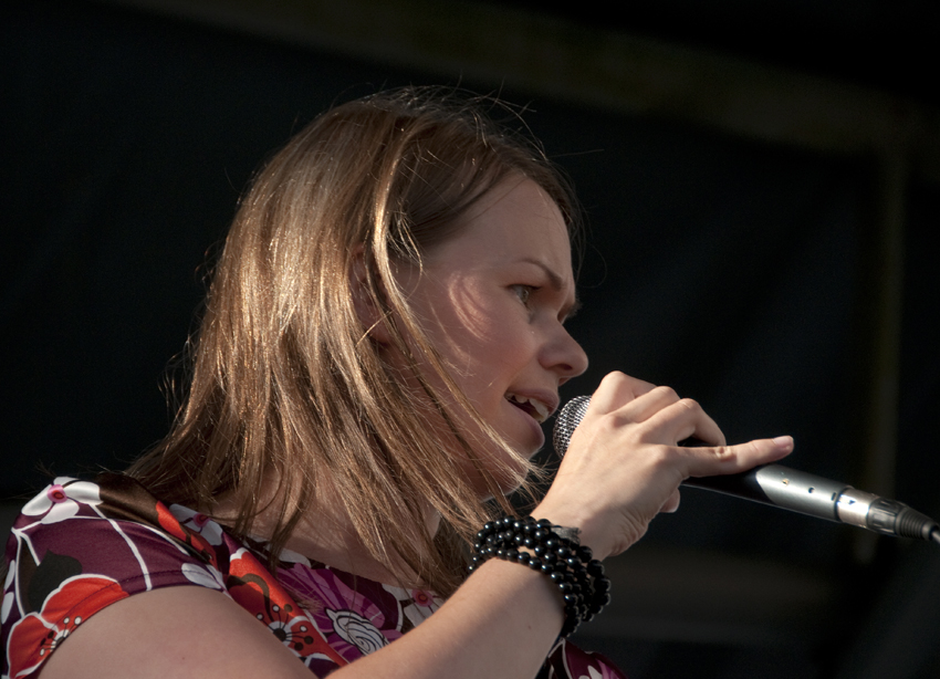 Susanna Eronen Pori Jazz festivaalilla 2010